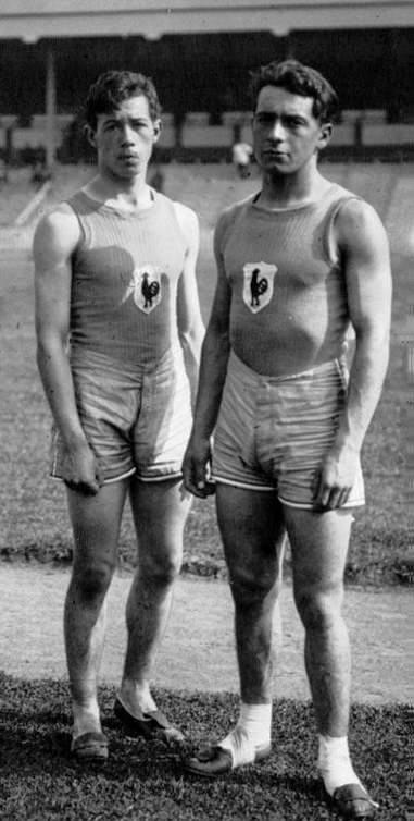 VIIes Olympiades à Anvers : équipe française de saut en longueur avec élan : de gauche à droite : Courtin, Coulon : [photographie de presse] / Agence Meurisse